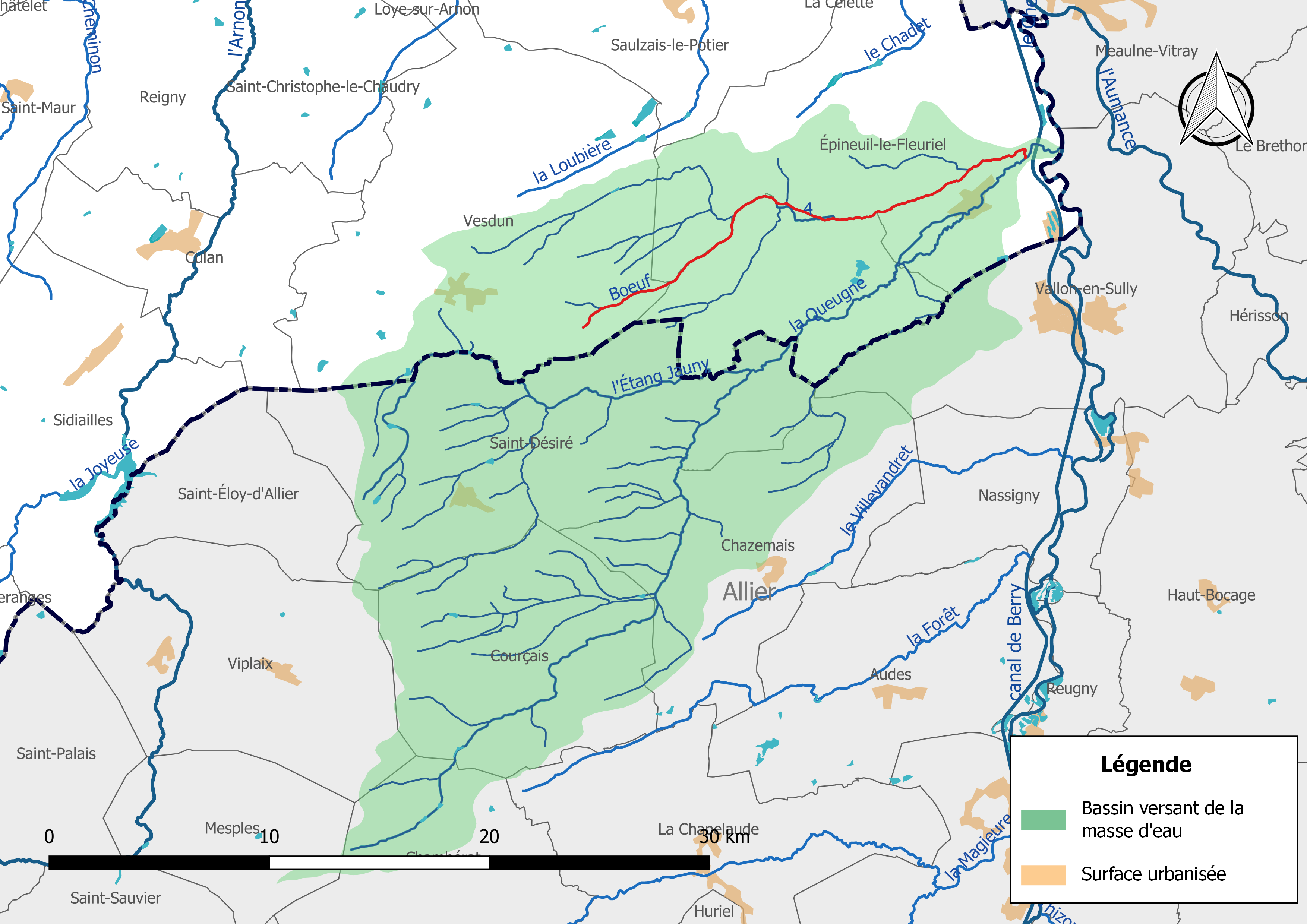 Carte de la masse d'eau « FRGR0321 », avec mise en exergue du cours d'eau « le Boeuf » (en rouge).